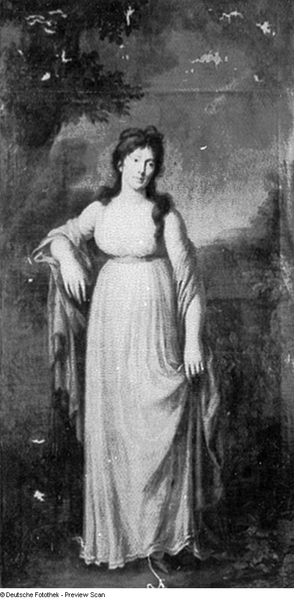 Bildnis der Marie Josepha von Carlowitz, geb. von Pötting und Persing (* 8. August 1776; † 22. Mai 1834)